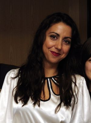 Carmen Ruiz premio a la mejor actriz en el festival CineCulpable09.